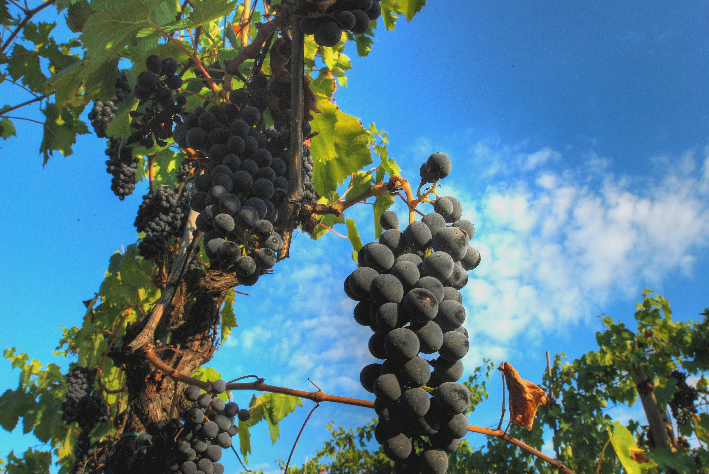 Sangiovese grape in Chianti